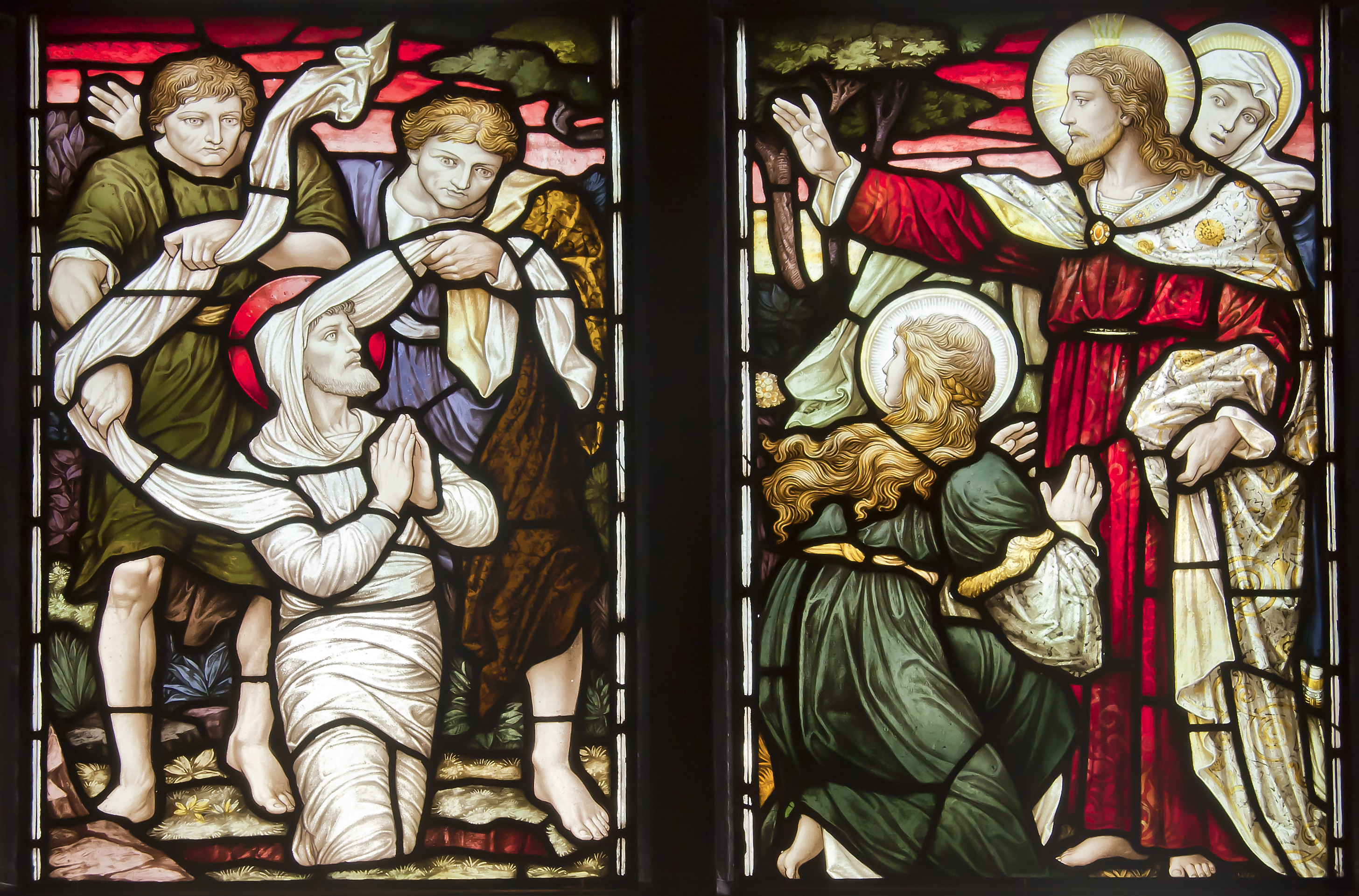 Kyrkfönster från 1800-talet i Nikolai kyrka i Örebro efter kartong av Carl Almquist. Motivet föreställer när Jesus uppväcker Lasaros från det döda.